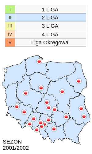 Jagiellonia Białystok w sezonie 2001/2002 -mapka